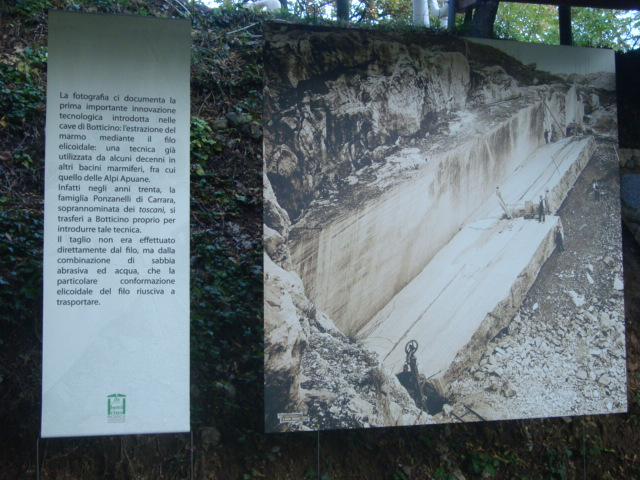 Pannello dell'Ecomuseo del botticino raffigurante la cava